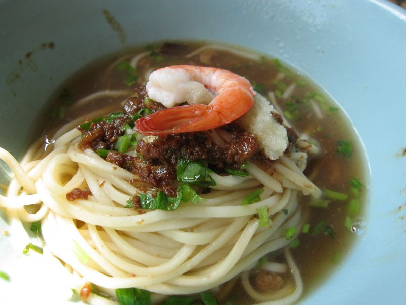 担仔麺台南-度小月擔子麵